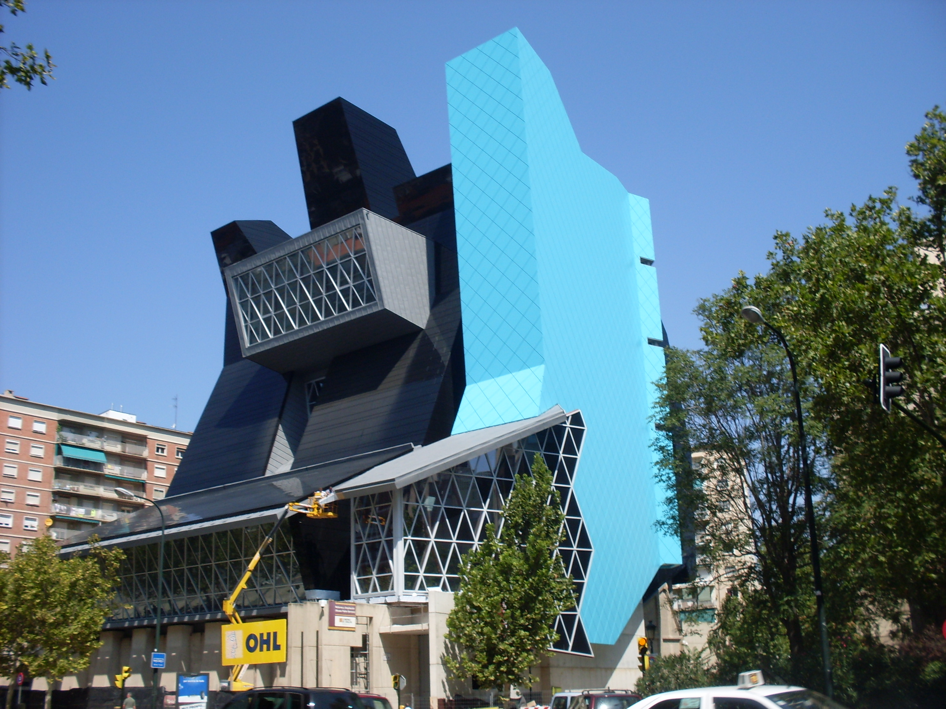 Museo Pablo Serrano en Zaragoza, septiembre de 2010.